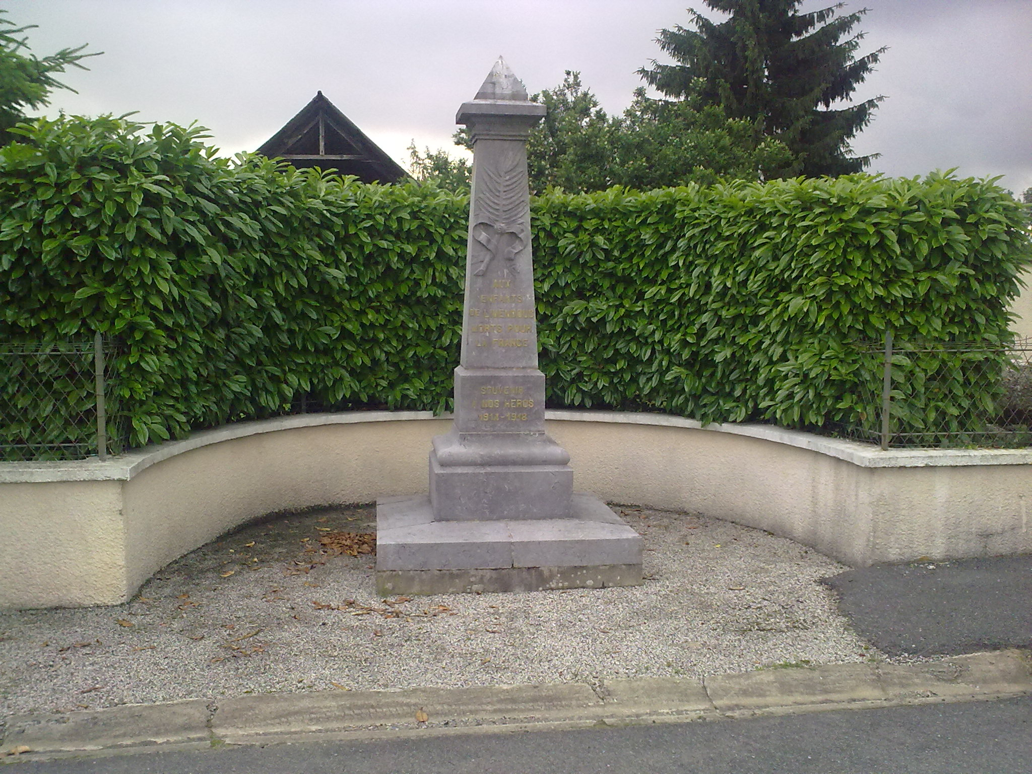 Limendous